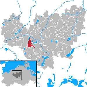 Gutow in Mecklenburg-Vorpommern - District Güstrow